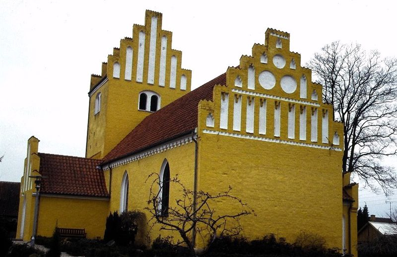 Nordrupøster Kirke i Danmark. Nordrupøster kirke